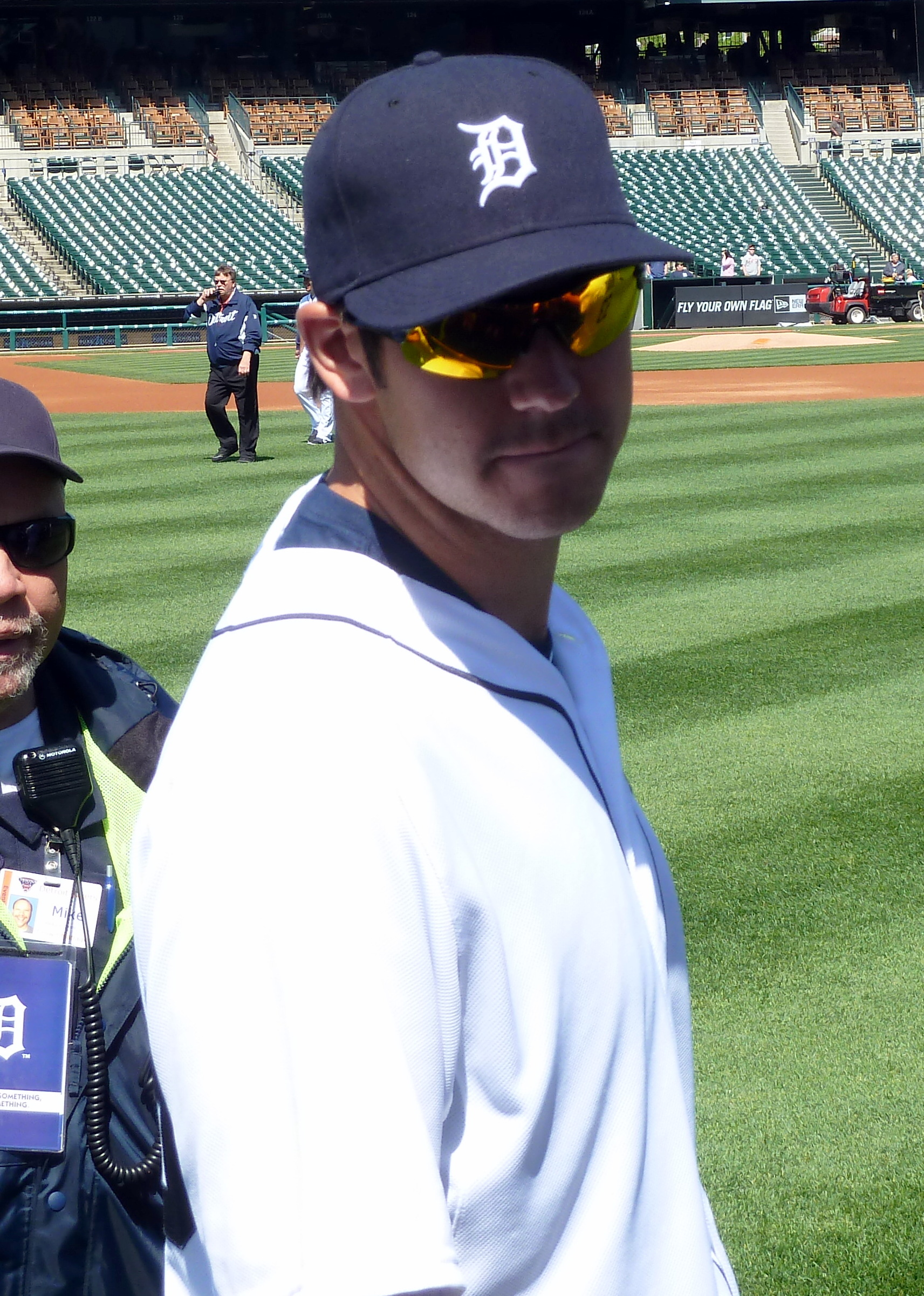 Luke Putkonen